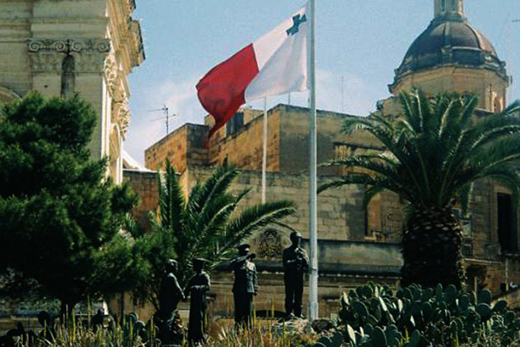 Monument de la Liberté à Vittoriosa, Malte